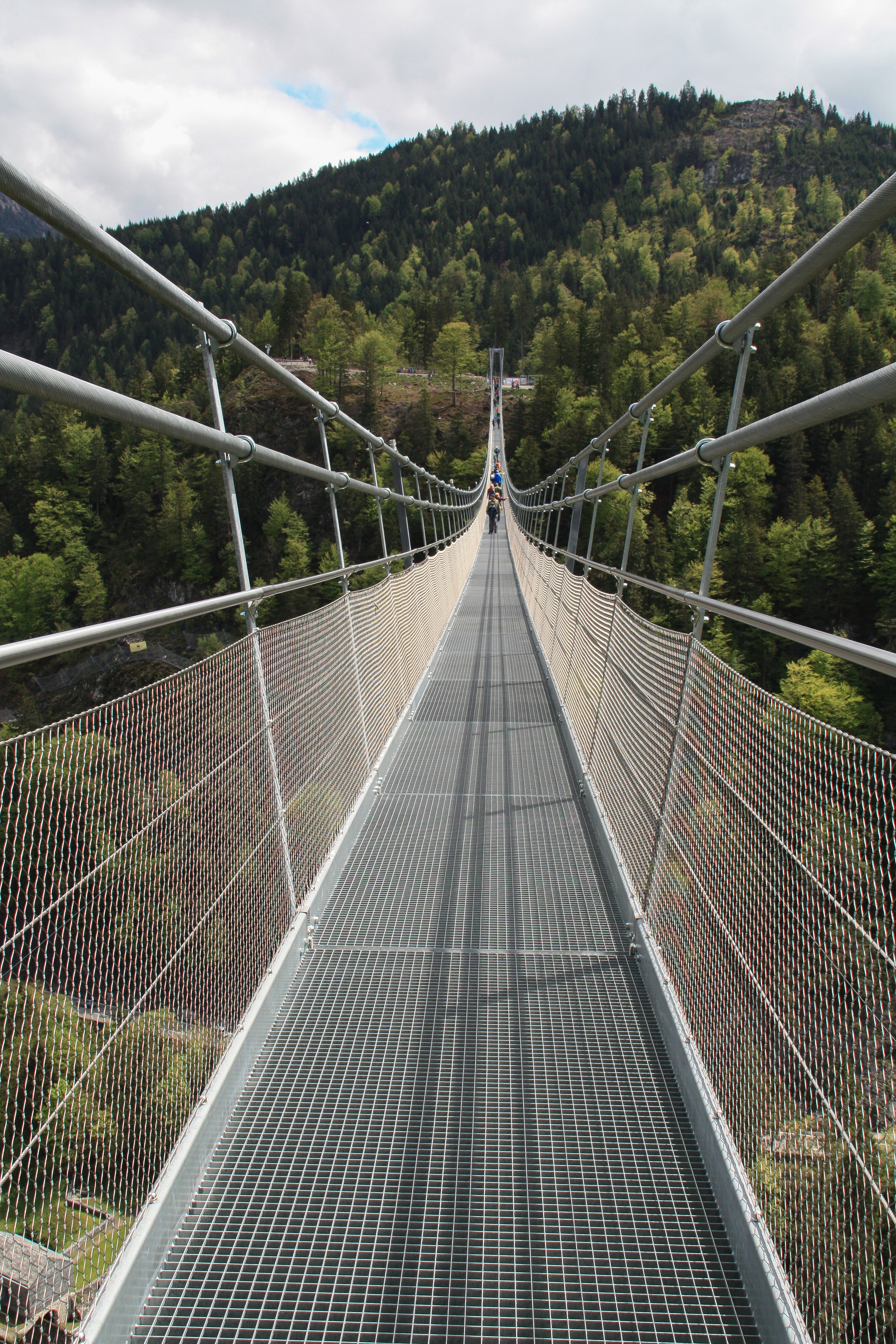 Highline 179